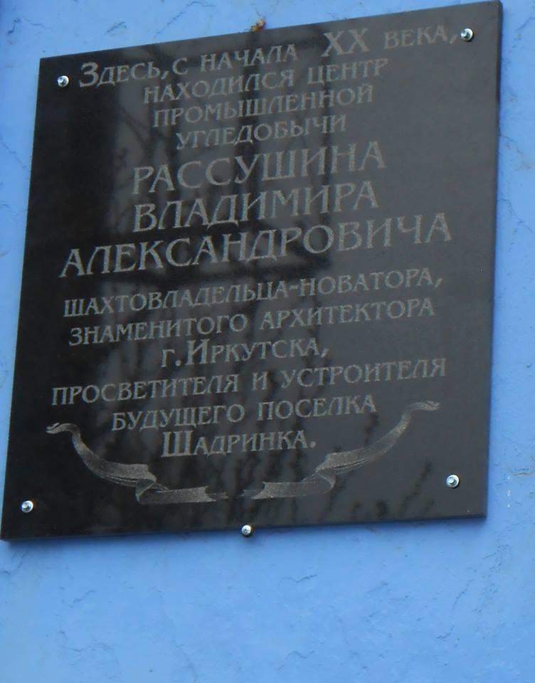 Мемориальная доска В А Рассушина в г Чермхова пос Шадрино